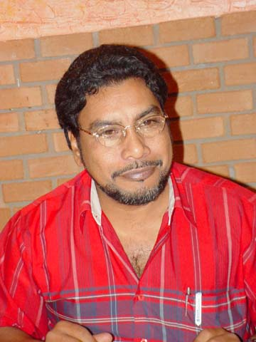 Oscar Figuera, Secretario General del Partido Comunista de Venezuela en el 2007.